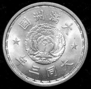 Manchukuo 10 FEN（满洲国1角硬币，大同三年）